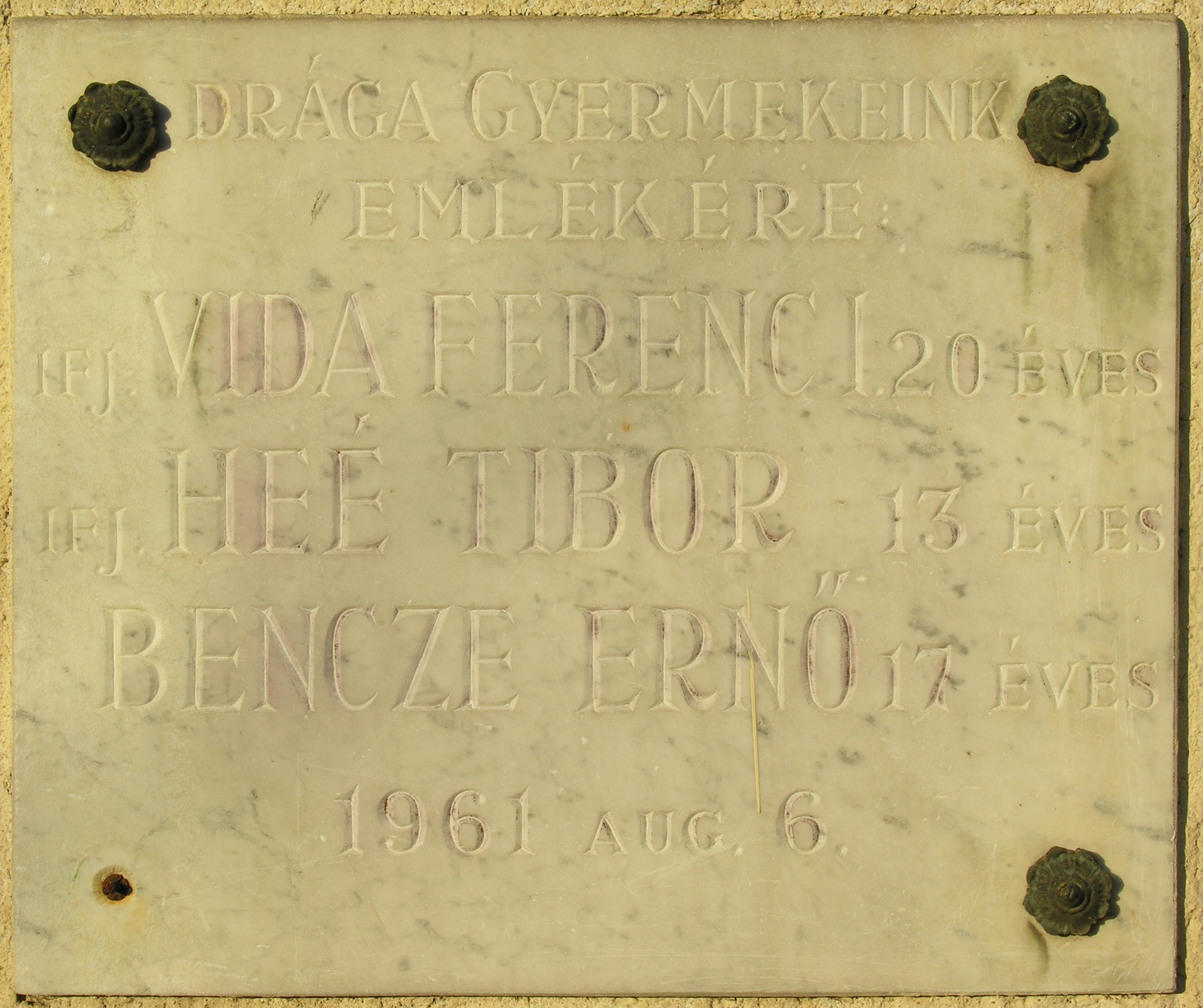 Az 1961. 08. 06-i légiszerencsétlenség földi áldozatainak emléktáblája, Budapest, XIV., Róna u. 224. (udvar)